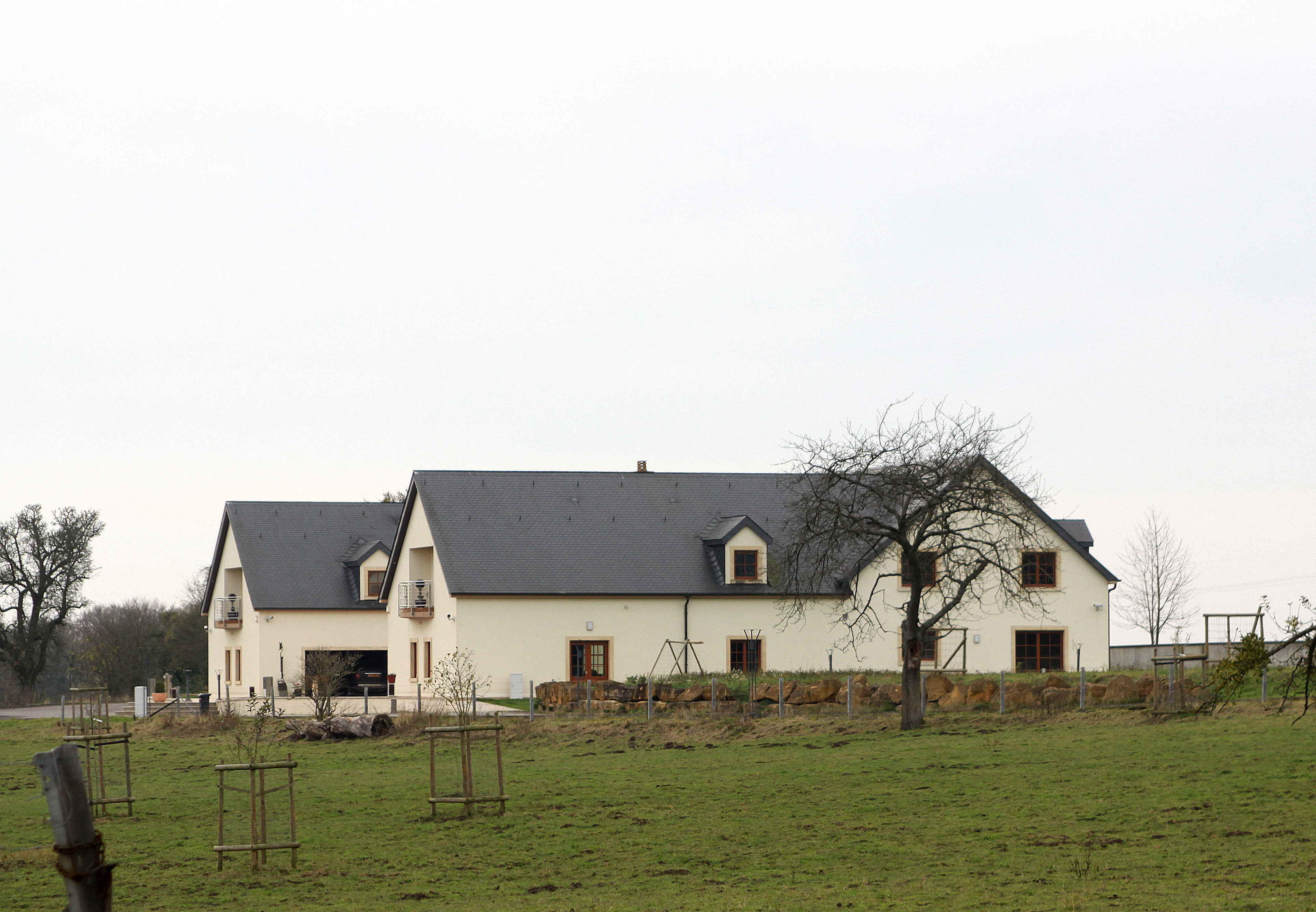 De Schierenerhaff am November 2012